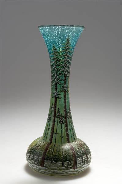 Váza s motivem zimní krajiny, vyrobená v roce 1905, akciovou společnosti BÁRTA a spol., ve Františkodolské sklárně. Váza je vyrobená z čirého, žlutého a modrého skla, prášek inkluze, zhruba leptaná, polychromatický smalt